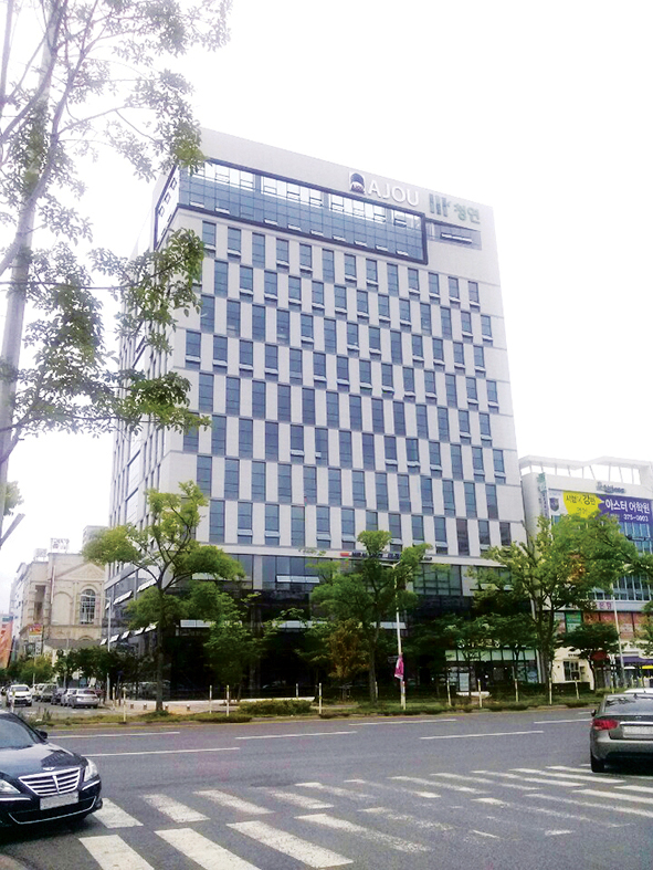 청연한방병원 상무